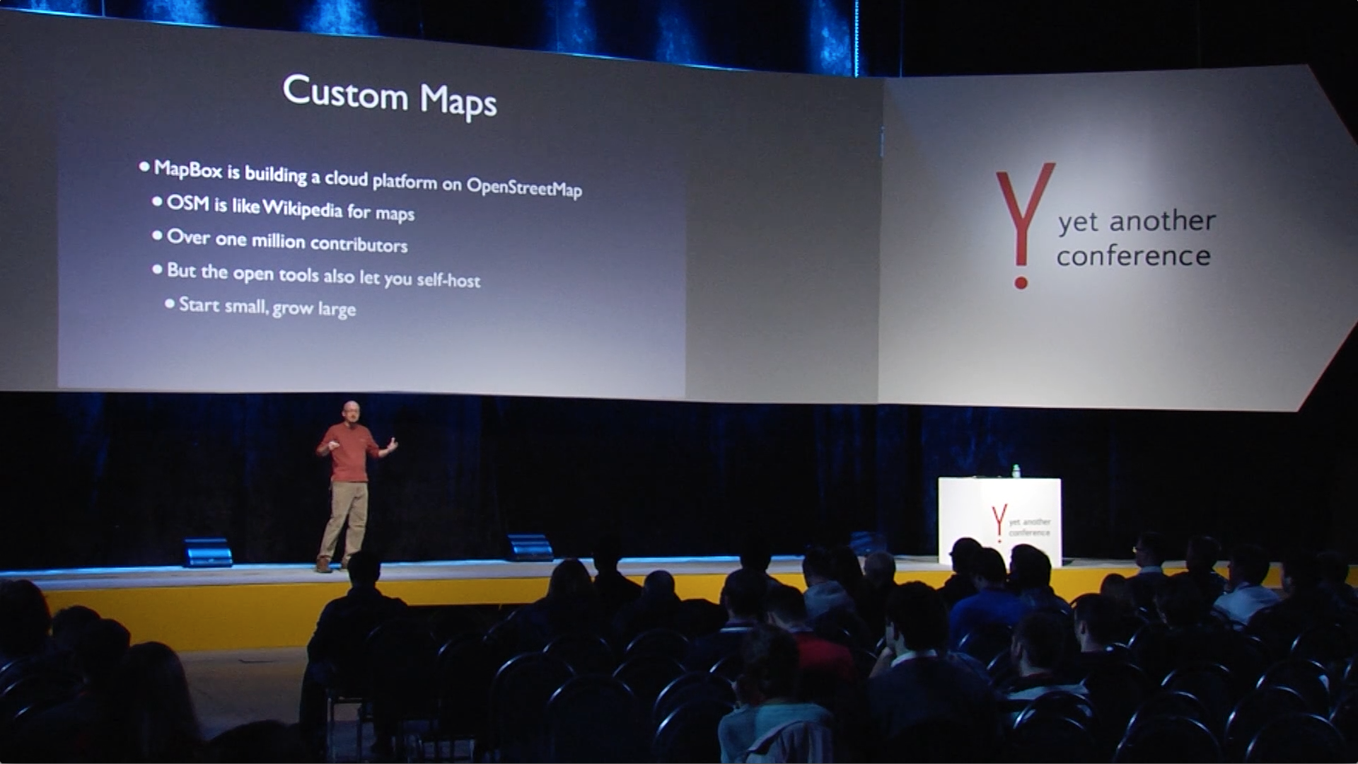 Ещё одна конференция 2015